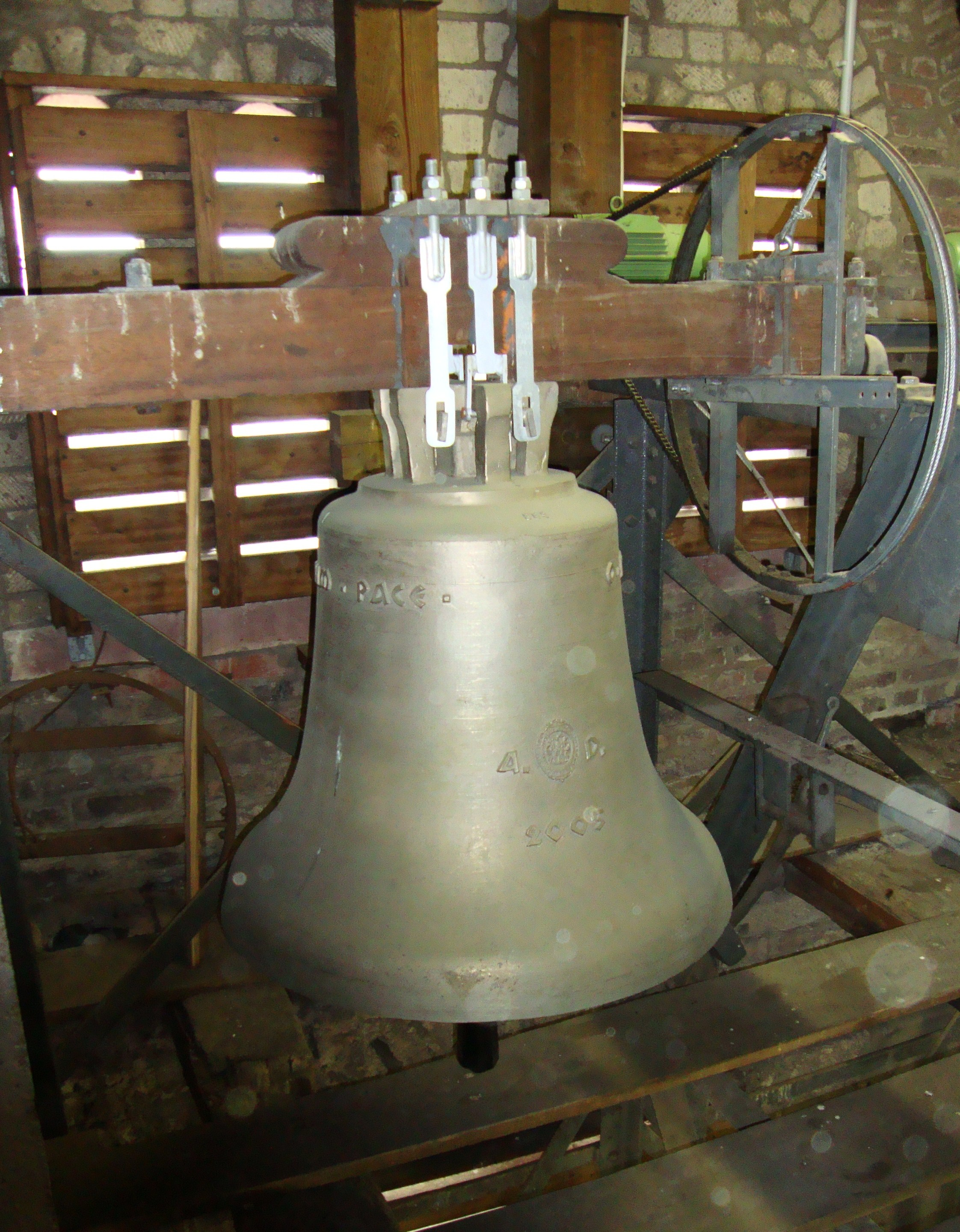 Christusglocke von 2005 in St. Maria in Lyskirchen zu Köln